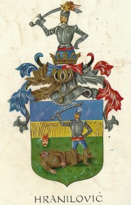 Grb uskočke plemićke obitelji Hranilović je zajedno sa plemićkom poveljom 1603. godine primio Juraj Hranilović i njegova obitelj zbog svojih zasluga u ratovima protiv Osmanlija. Plemstvo je ovoj obitelji potvrđeno 1609. u Hrvatskom saboru.